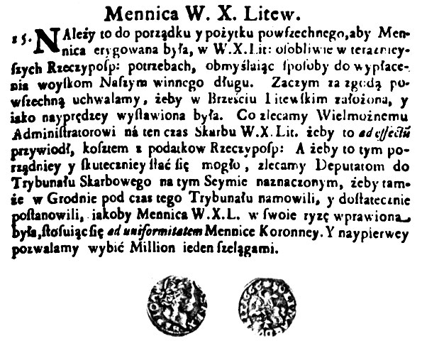 Документ 1659 г.